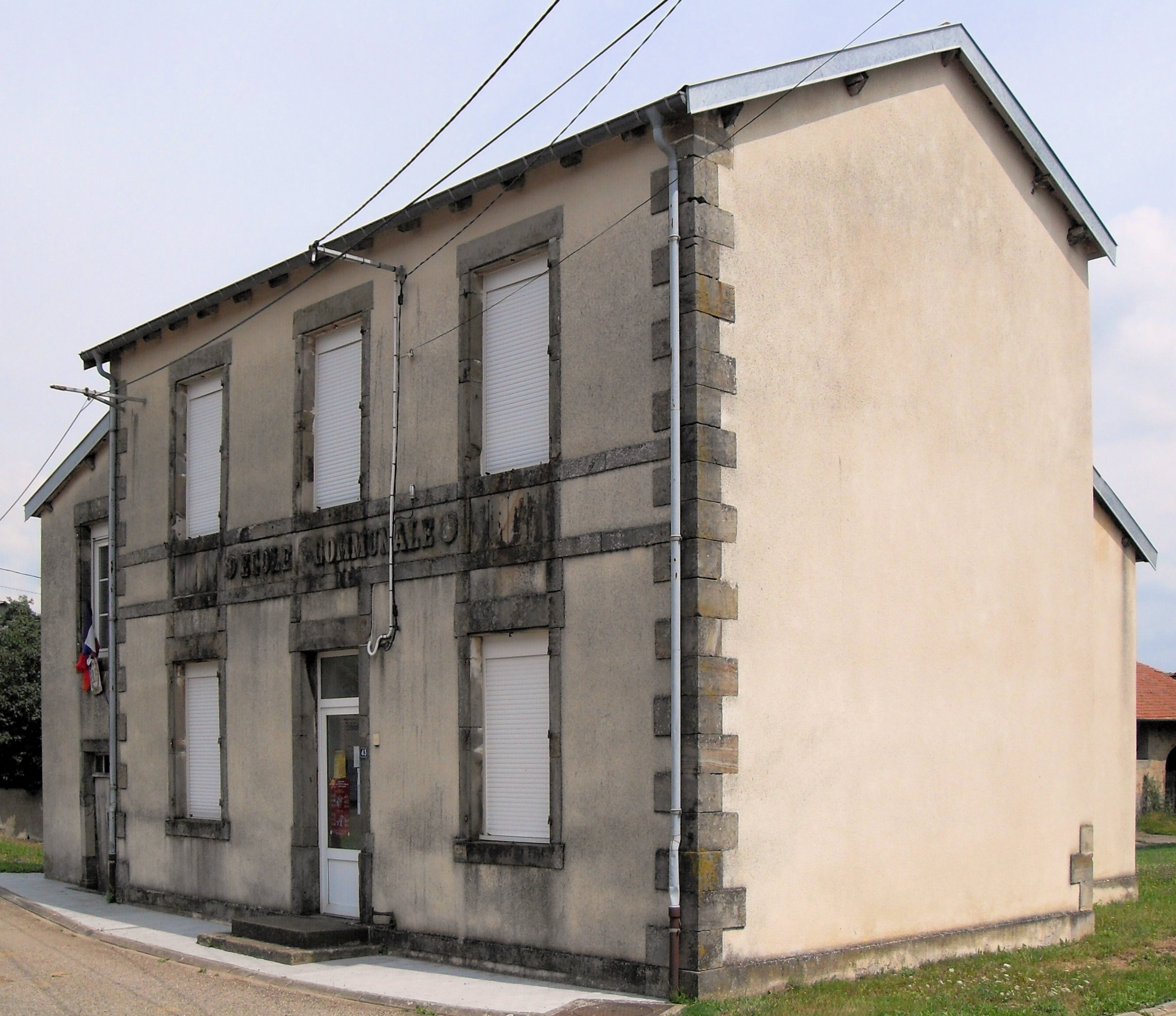 La mairie de Blémerey (Département des Vosges), l'ancienne école communale